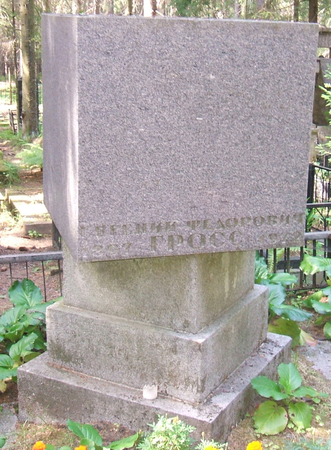 Комаровское кладбище Деятели культуры и науки